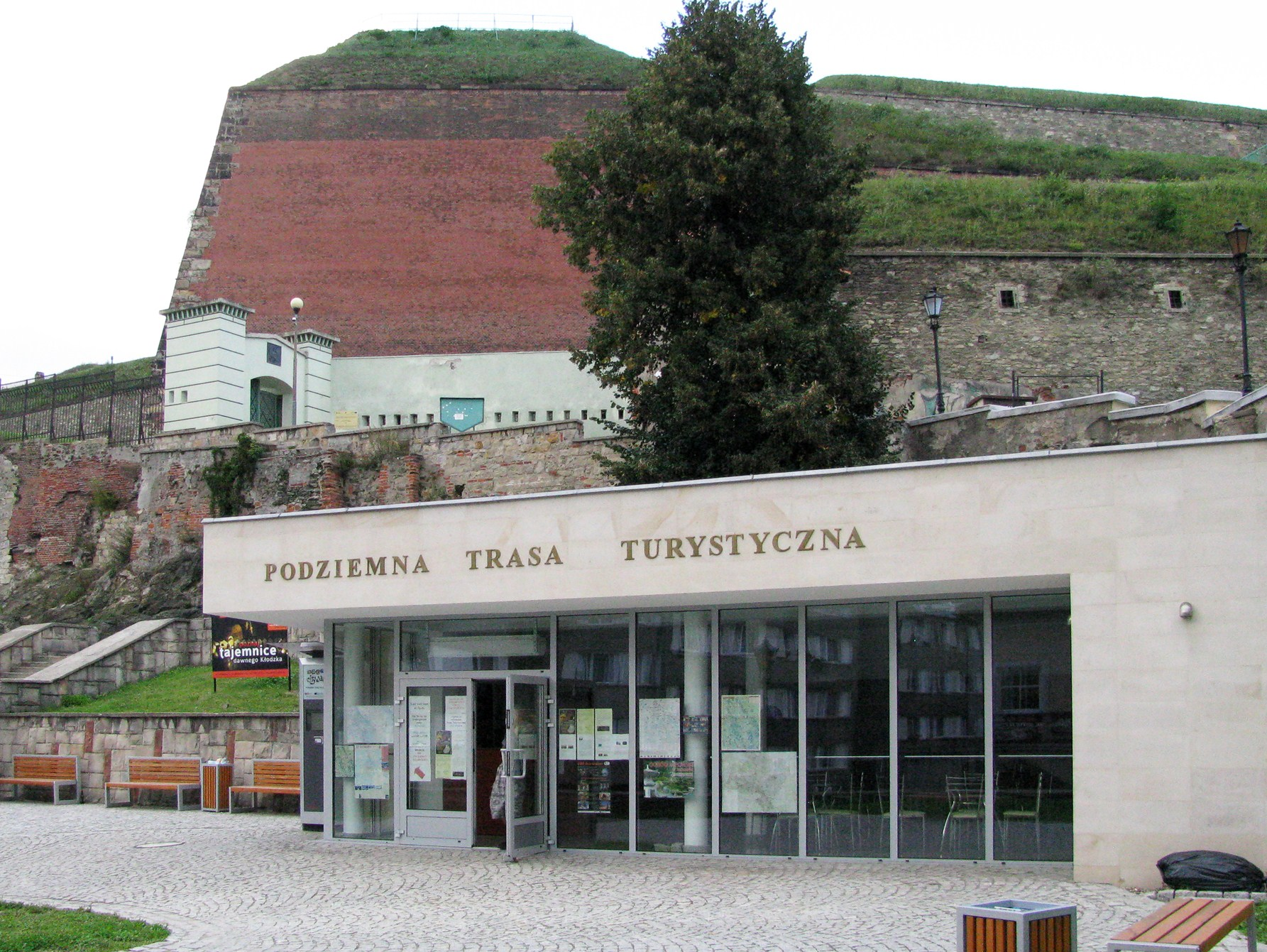 podziemna trasa turystyczna (część podziemi XVIII) Kłodzko, Kłodzko 01.1977.